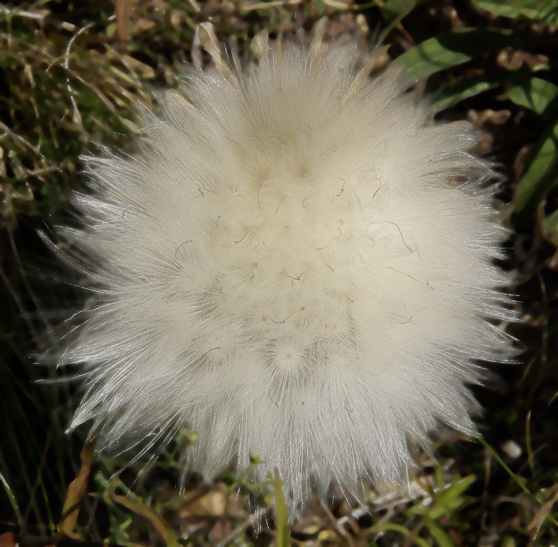 Akène de la Carline acaule (Carlina acaulis)